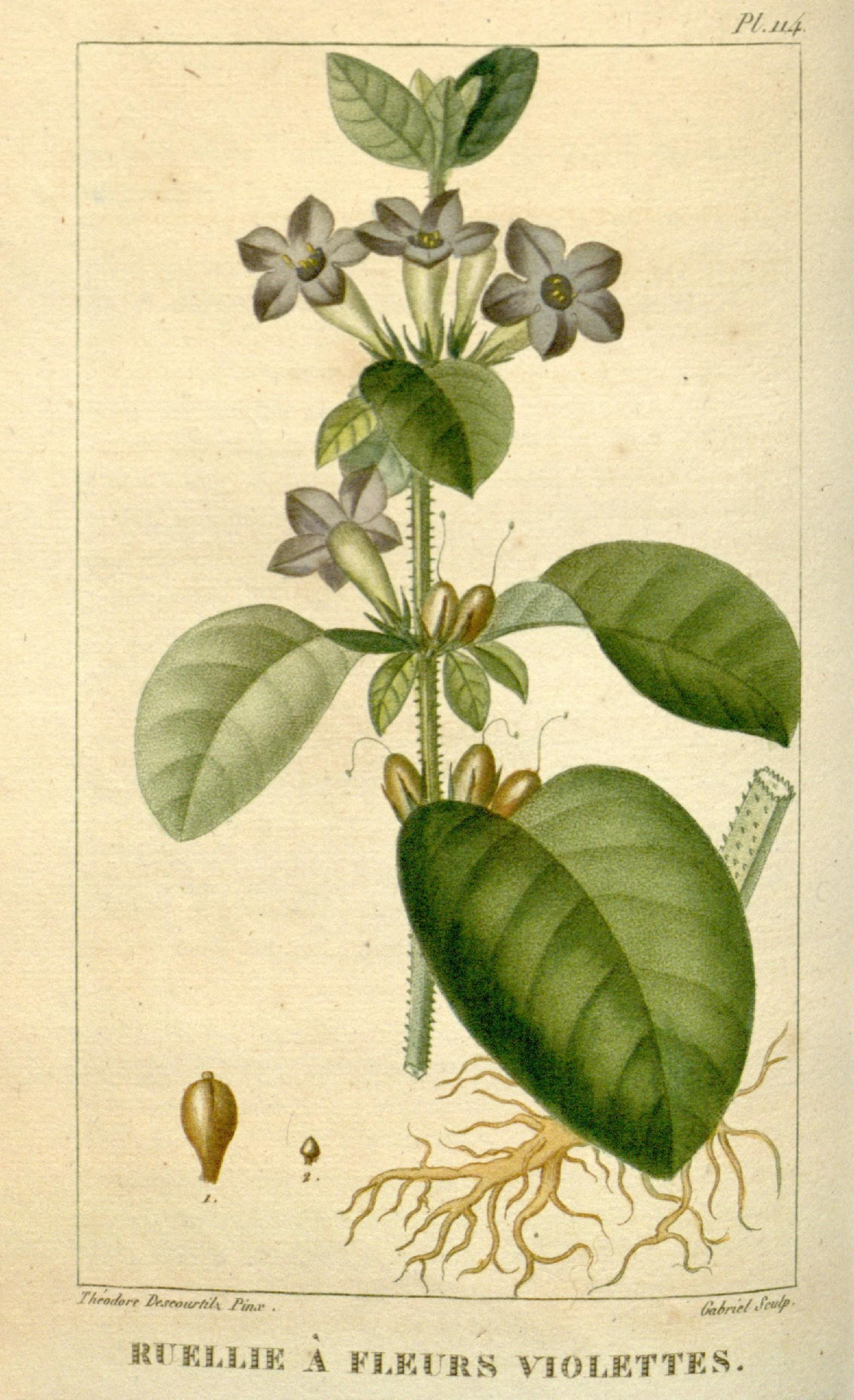 N.jx4 TAroi/ore l'r-.rratùT/i/^ J^^^r . ^//Y^//^^ K^'KLIJI/ A Fî.EriiS VIOLETTES